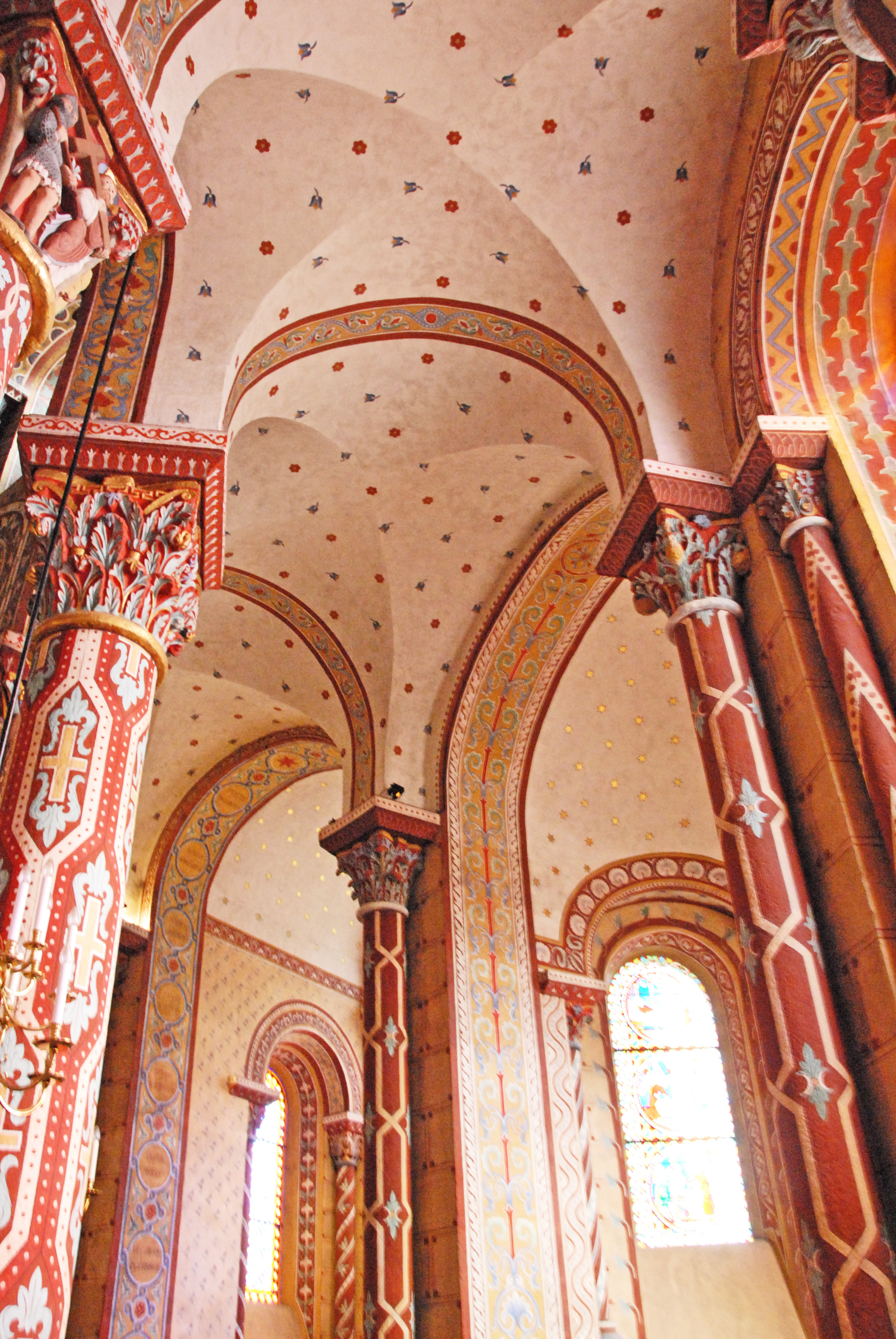 südöstl. Chorumgang